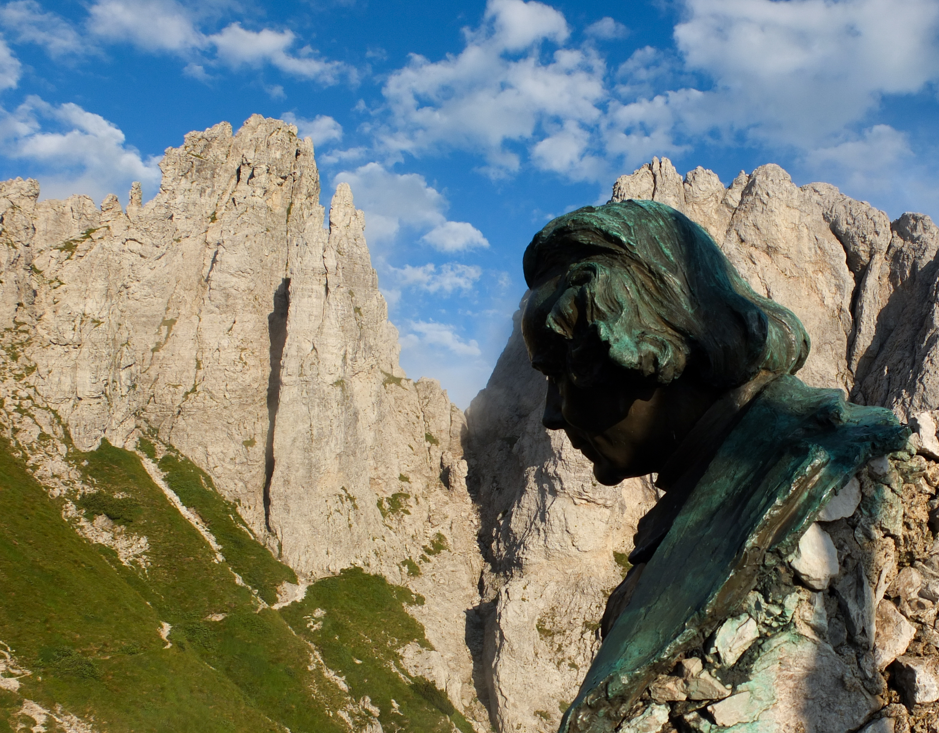 Grigne (Q47478903)